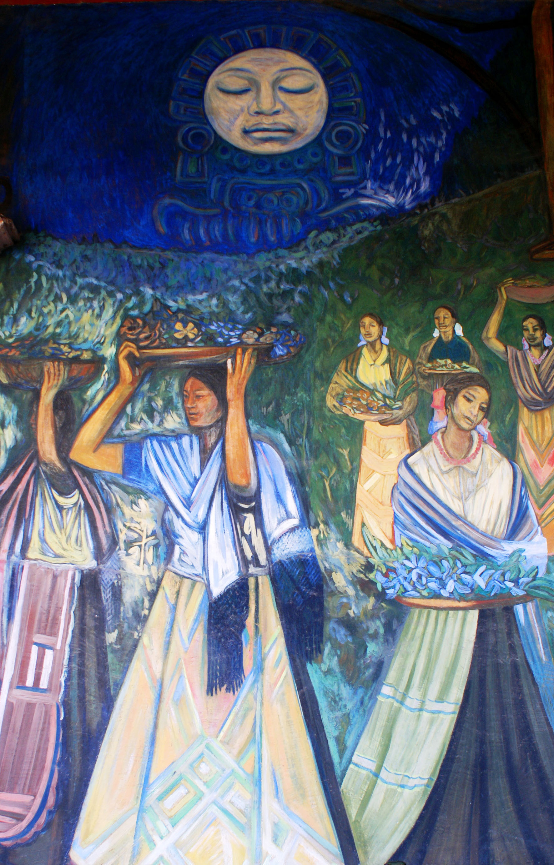 Fragmento de pintura mural Titulo del mural: “Gente y paisaje de Michoacán” Autor: Alfredo Zalce Año: 1962 Ubicación: Palacio de Gobierno de Michoacán Morelia, Michoacán, México.